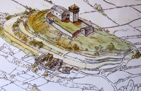 recreació castell de Bagà del s.XIII